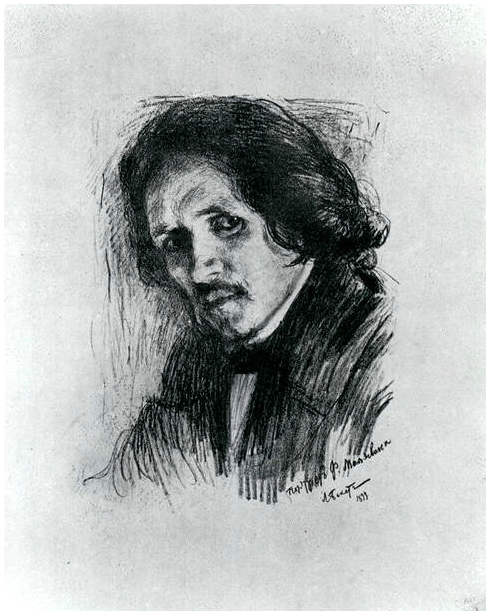 Portrait des russischen Malers Filipp Andrejewitsch Maljawin, Lithographie, 32x23 cm. Russisches Museum, St Petersburg